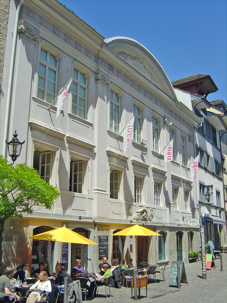 Das Theater am Neumarkt in Zürich. Früher Zunfthaus zur Schuhmachern. Erbaut 1742 von David Morf. Seit 1956 Sitz der Zunft Hottingen.